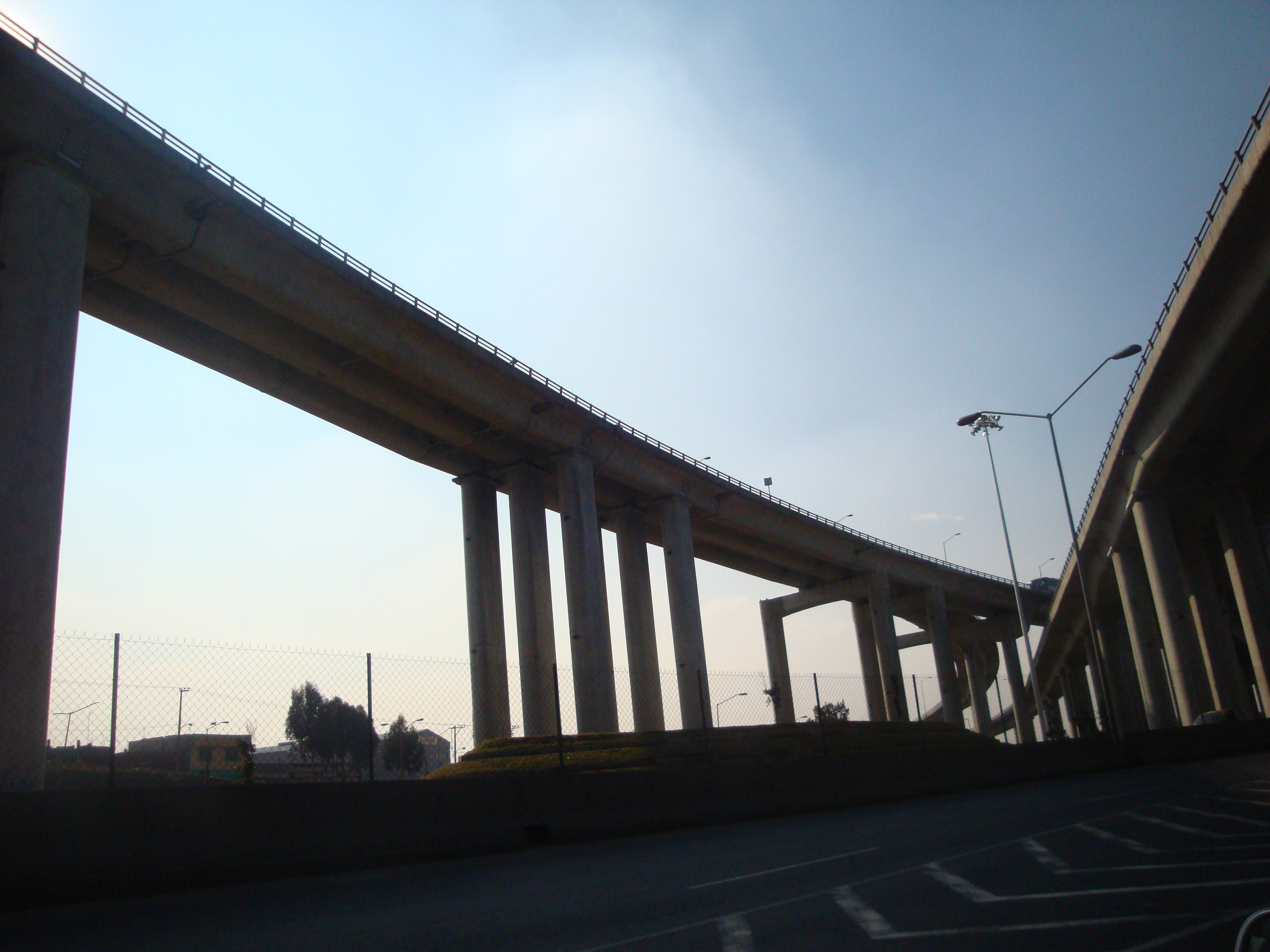 Distribuidor vial "La Concordia" Idea del contador publico Luis Antonio Garcia Miguel